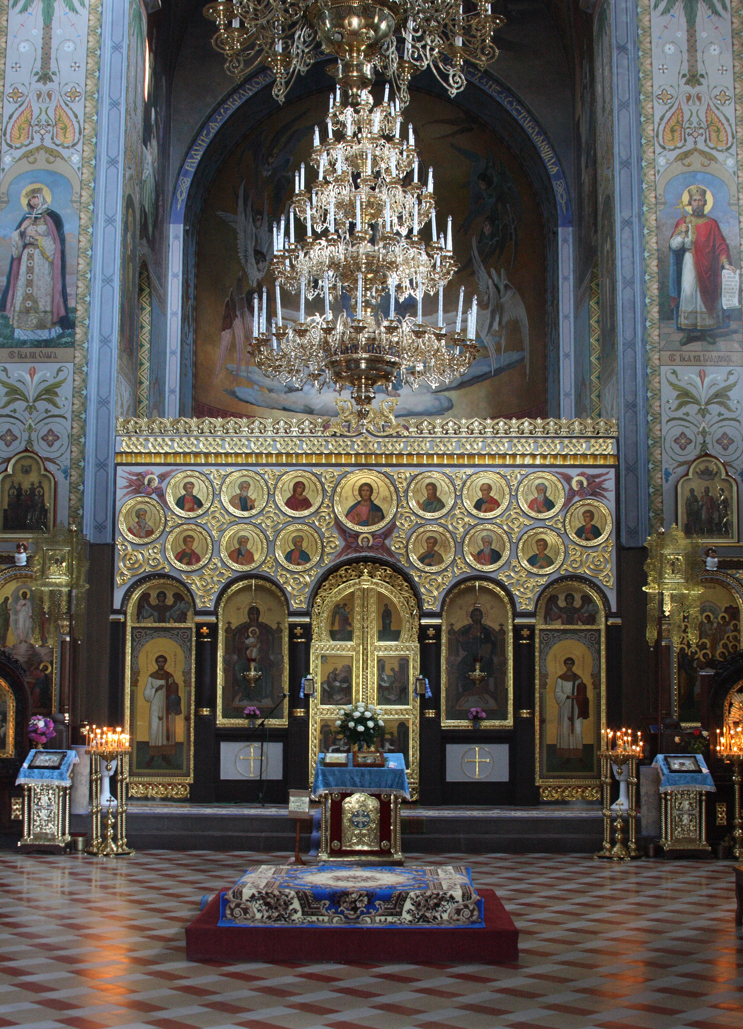 Кафедральный Успенский собор УПЦ МП во Владимире-Волынском, интерьер